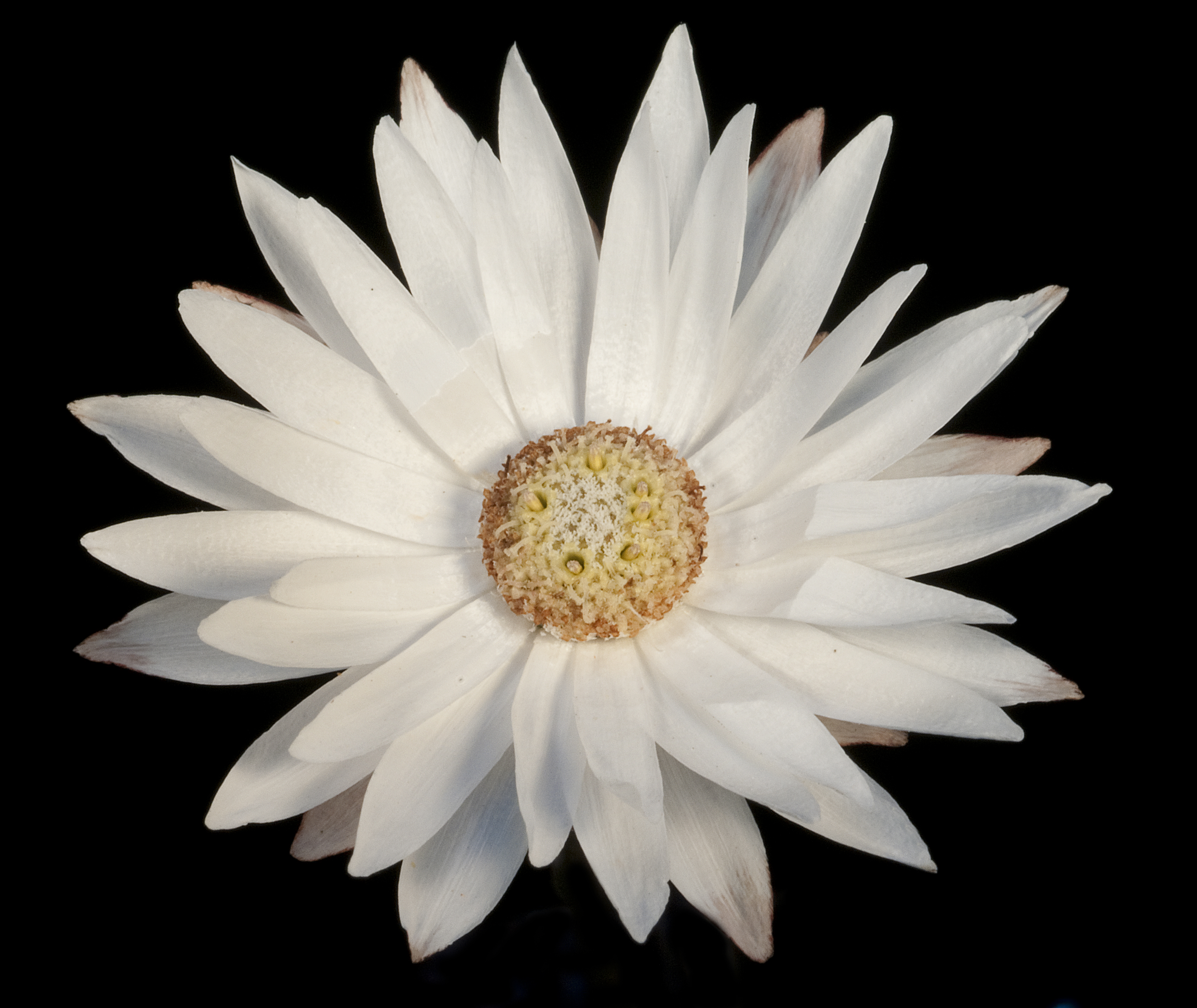 KRT4775